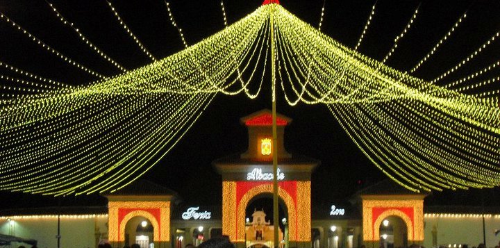 Puerta de hierros de Albacete el año del tercer centenario (2010)